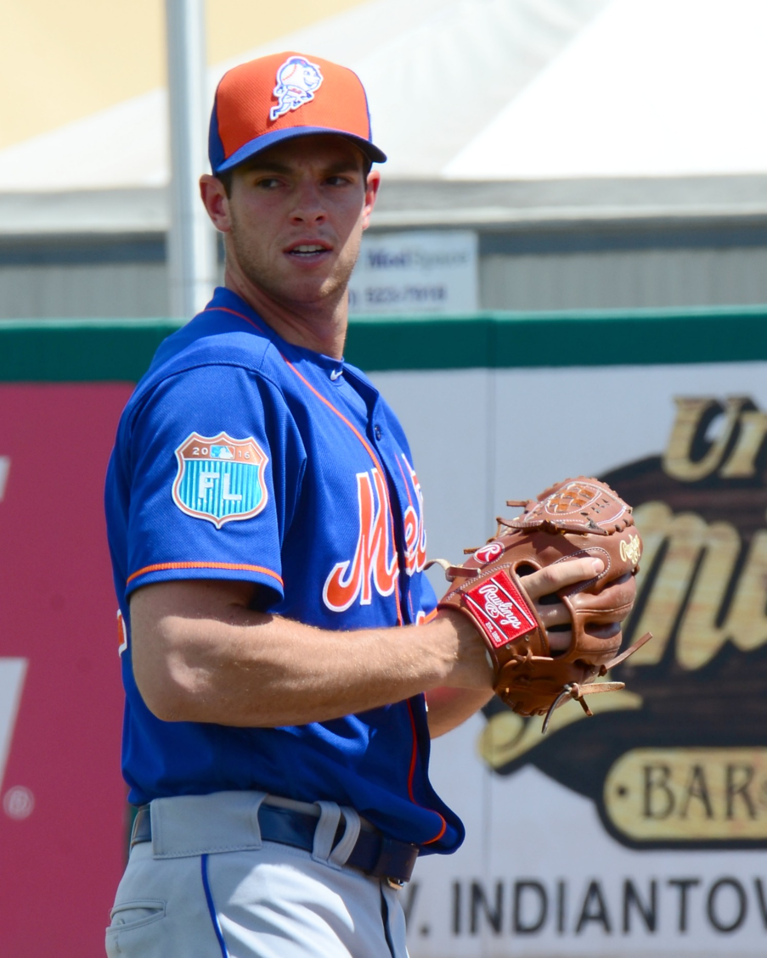 Steven Matz on March 17, 2016